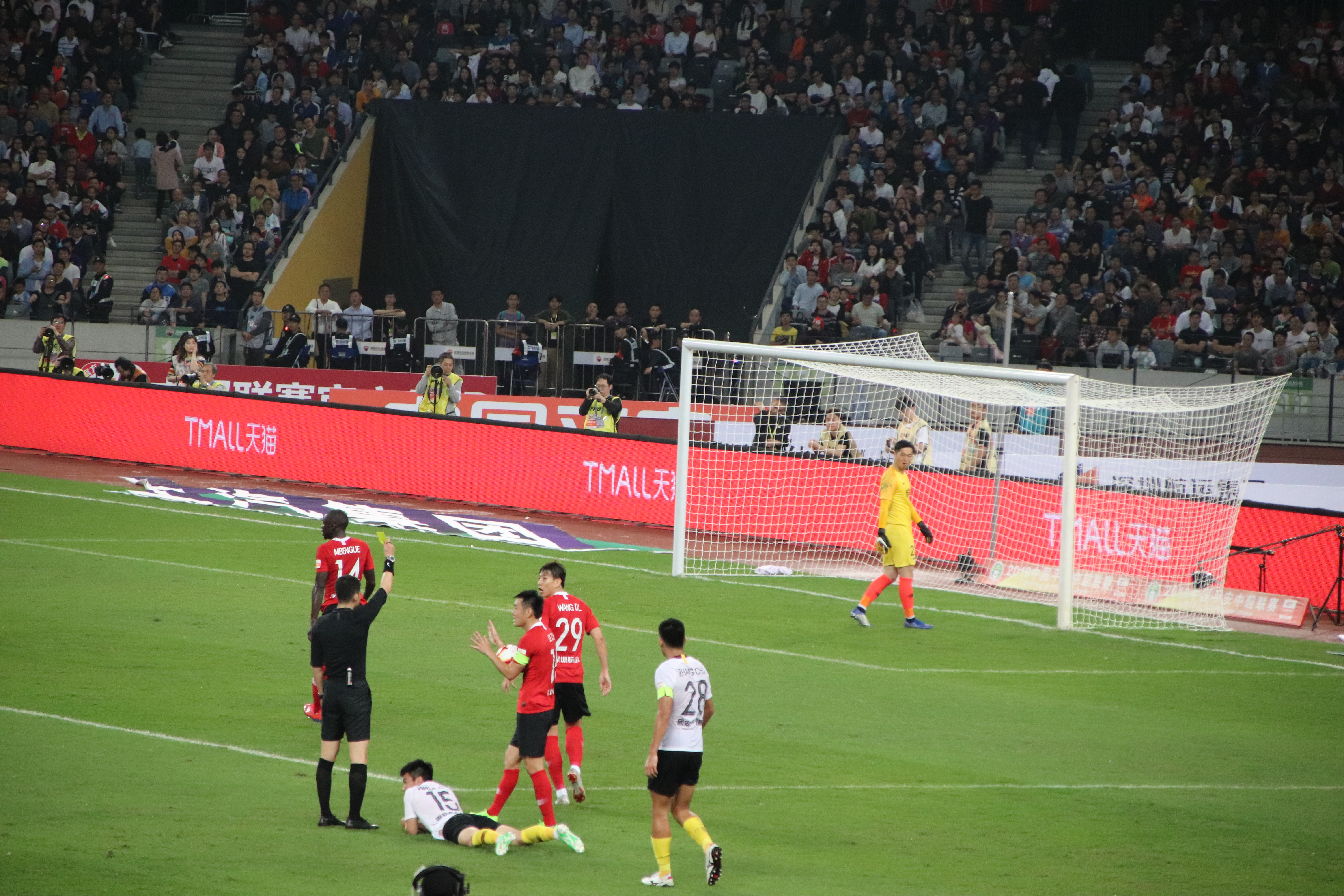 中文（中国大陆）: 足球比赛中的裁判出示黄牌